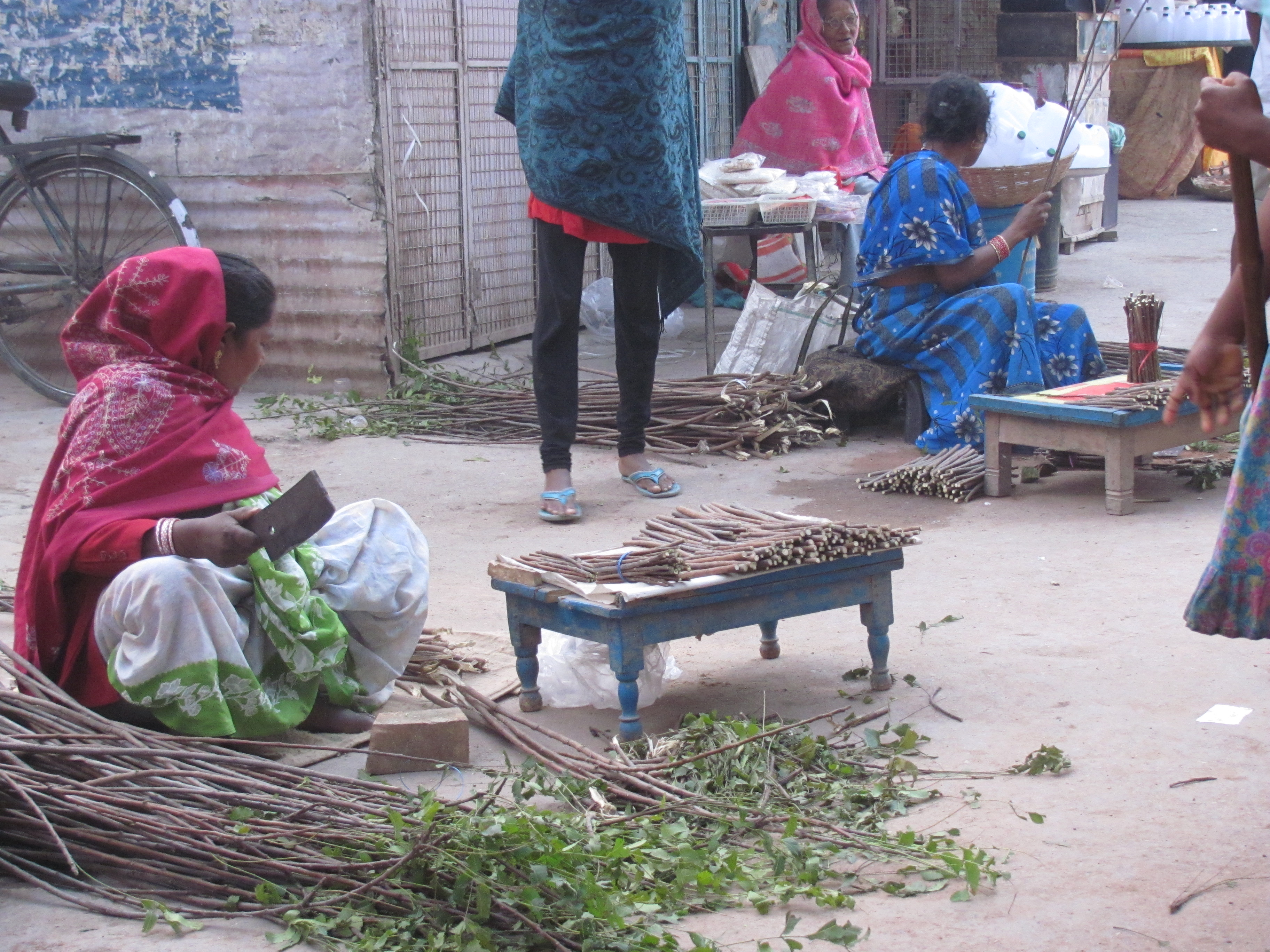 ബനാറസിൽ വേപ്പിൻ തണ്ടു വിൽക്കുന്ന സ്ത്രീകൾ